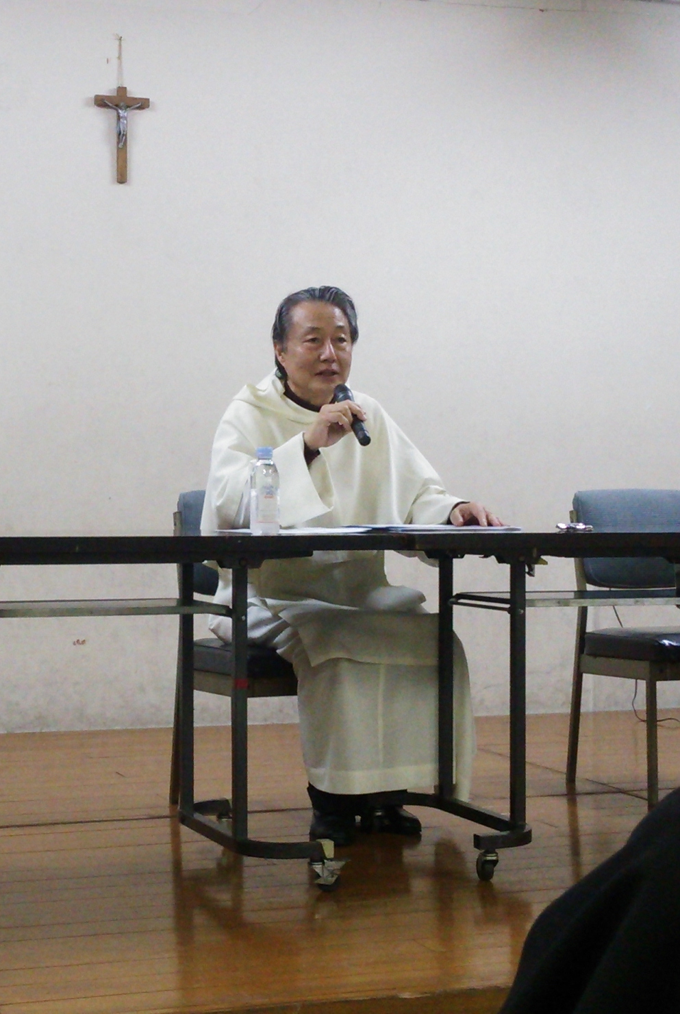 Sacrae Theologiae Magister (STM) 名誉称号授与式.記念講演。東京・カトリック渋谷教会.聖ドミニコ会修道院講堂